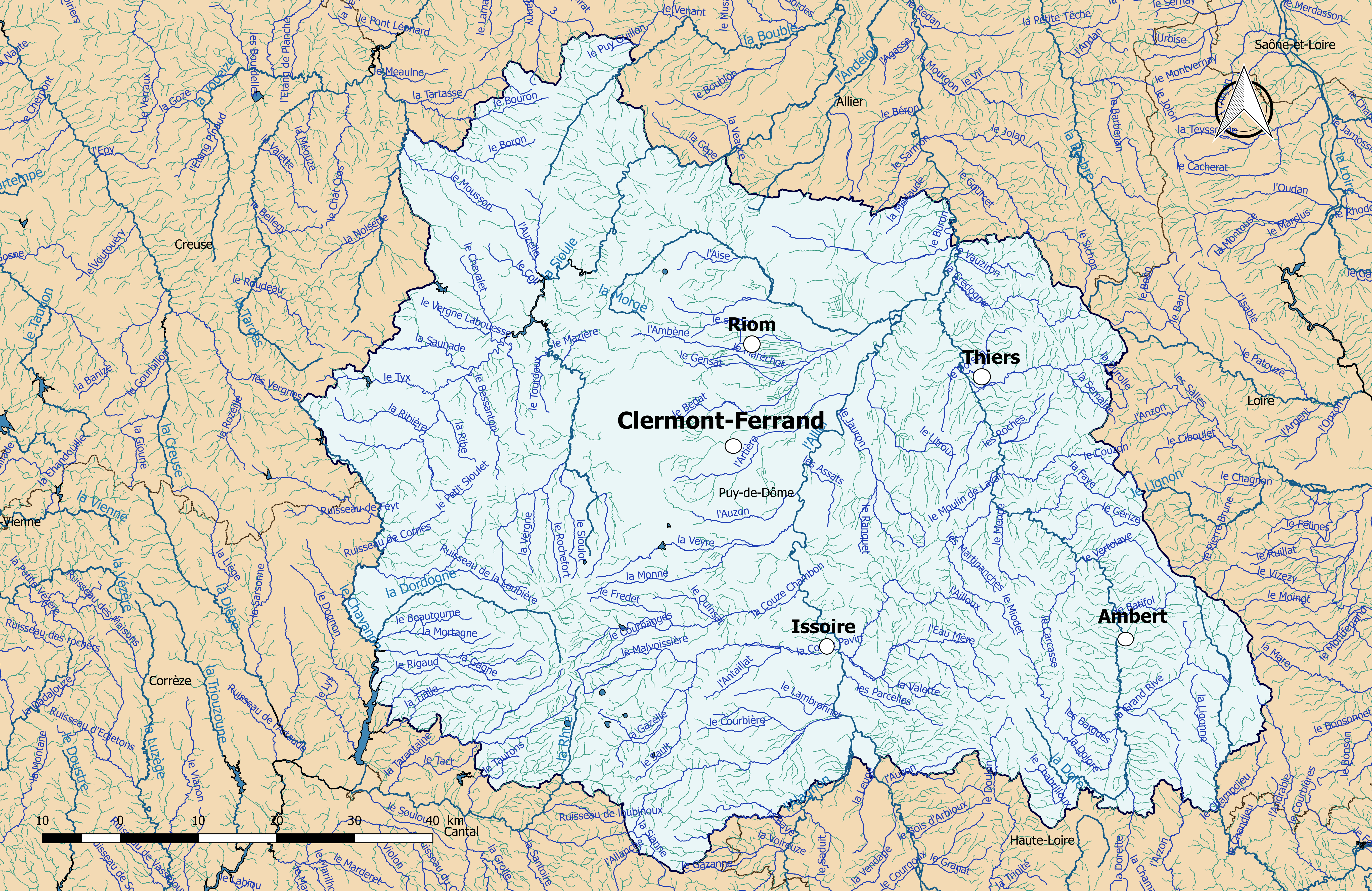 Carte du réseau hydrographique dans le département du Puy-de-Dôme (France).